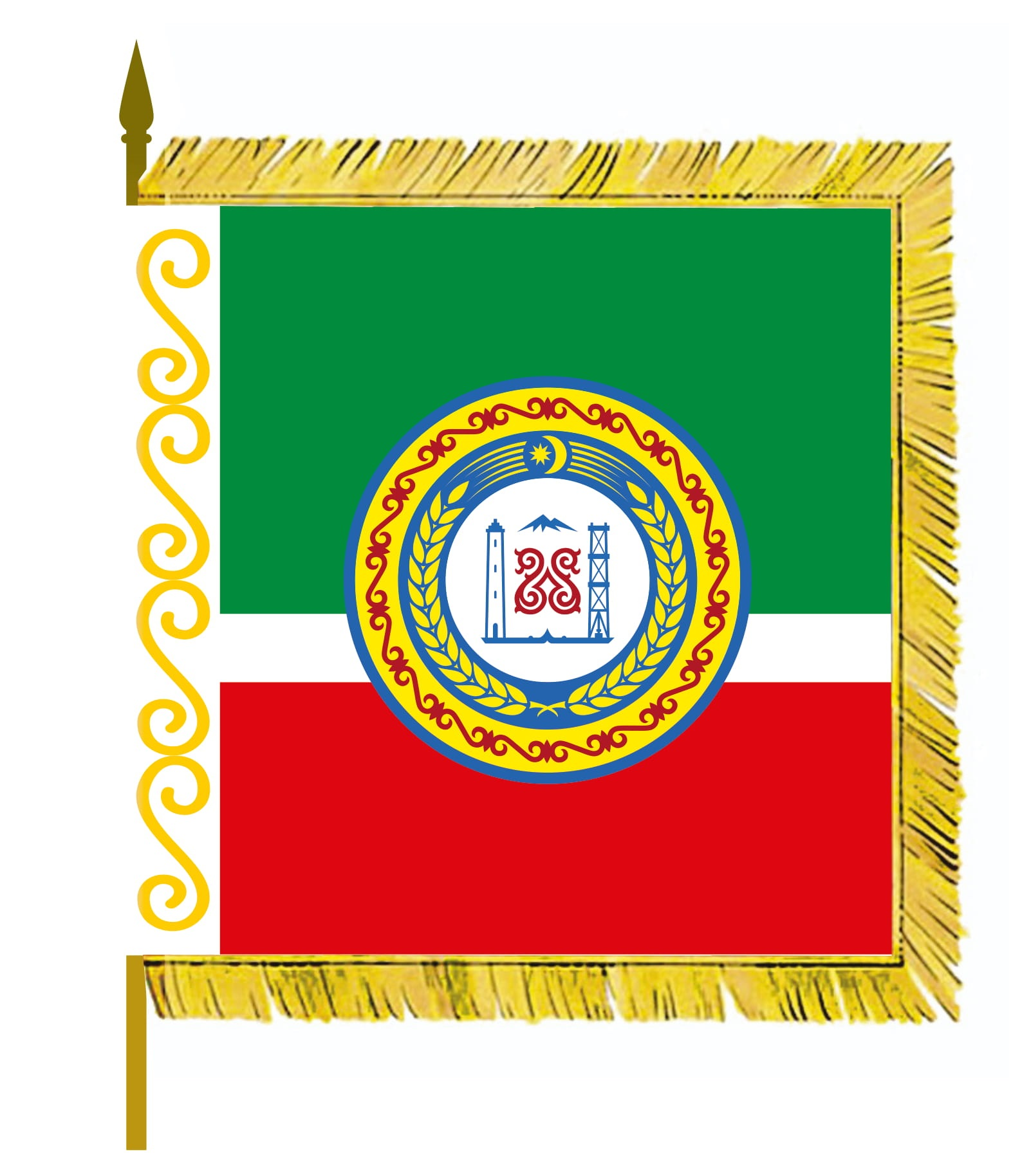 Штандарт Президента Чеченской Республики